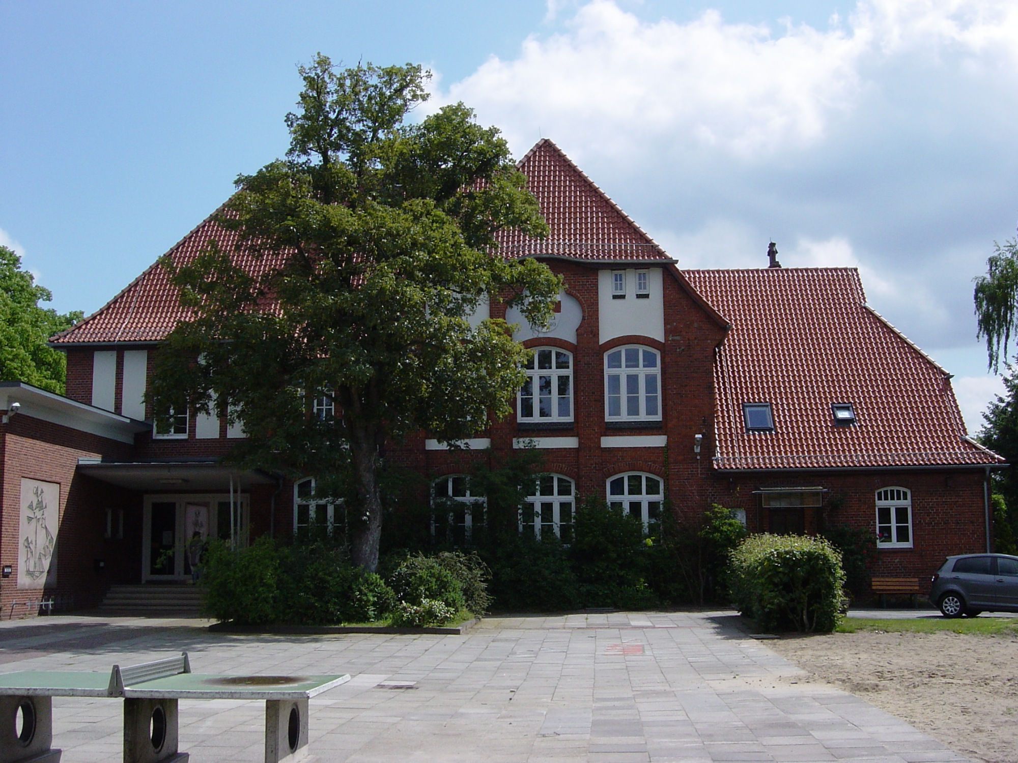 Grundschule Arbergen, Heisiusstr. 7, 28307 Bremen